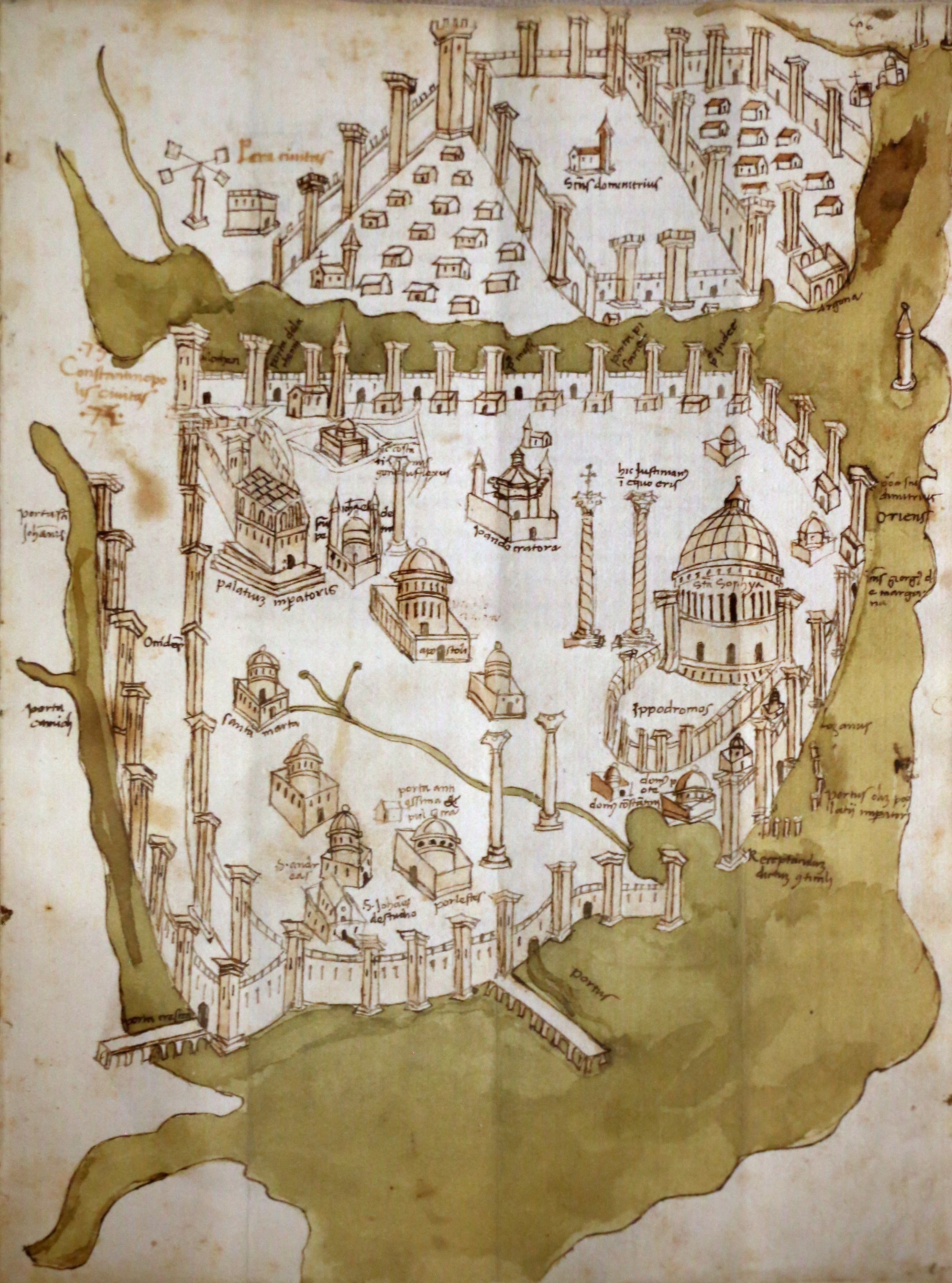 Palazzo Lanfranchi This is a photo of a monument which is part of cultural heritage of Italy.